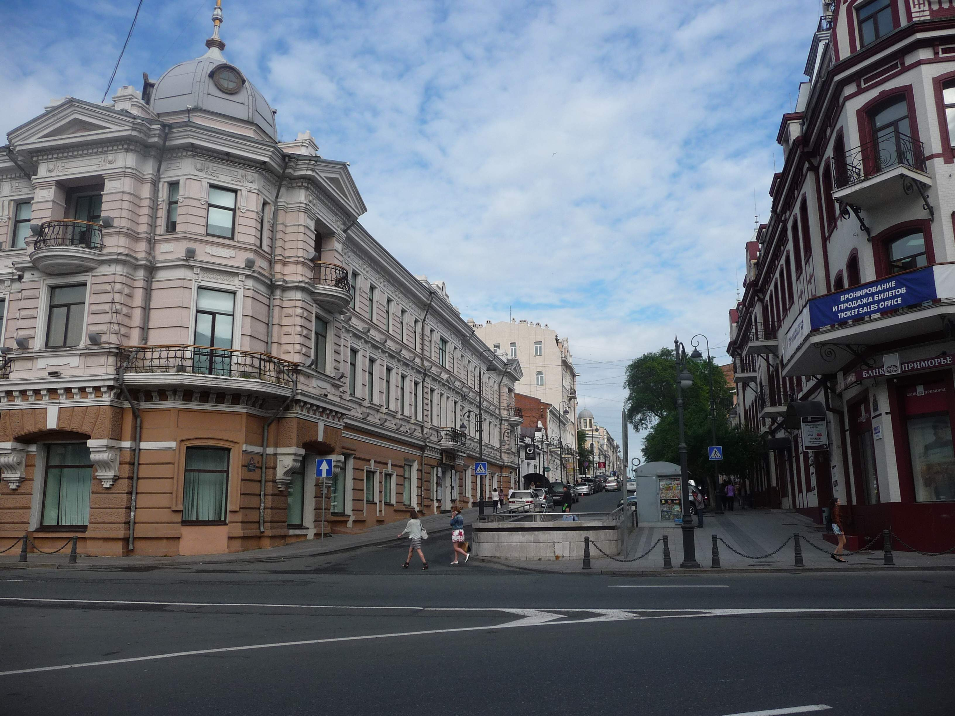 Владивосток, перекрёсток Светланской и Алеутской, 2015-07-03. Уходящая вдаль улица — Светланская в сторону Спортивной гавани.